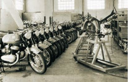 Moto Puma. Quinta Serie